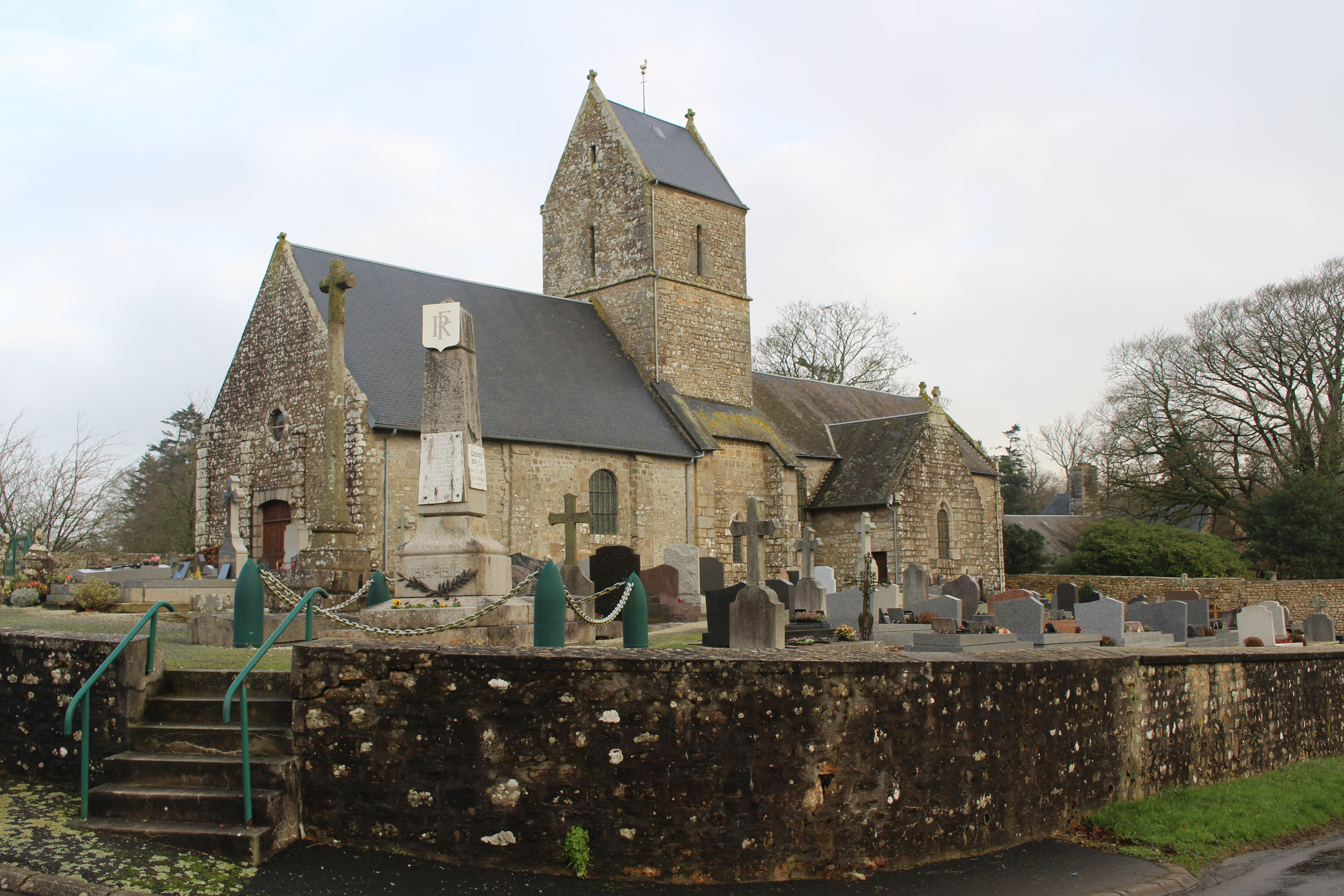 La Rochelle-Normande, Manche